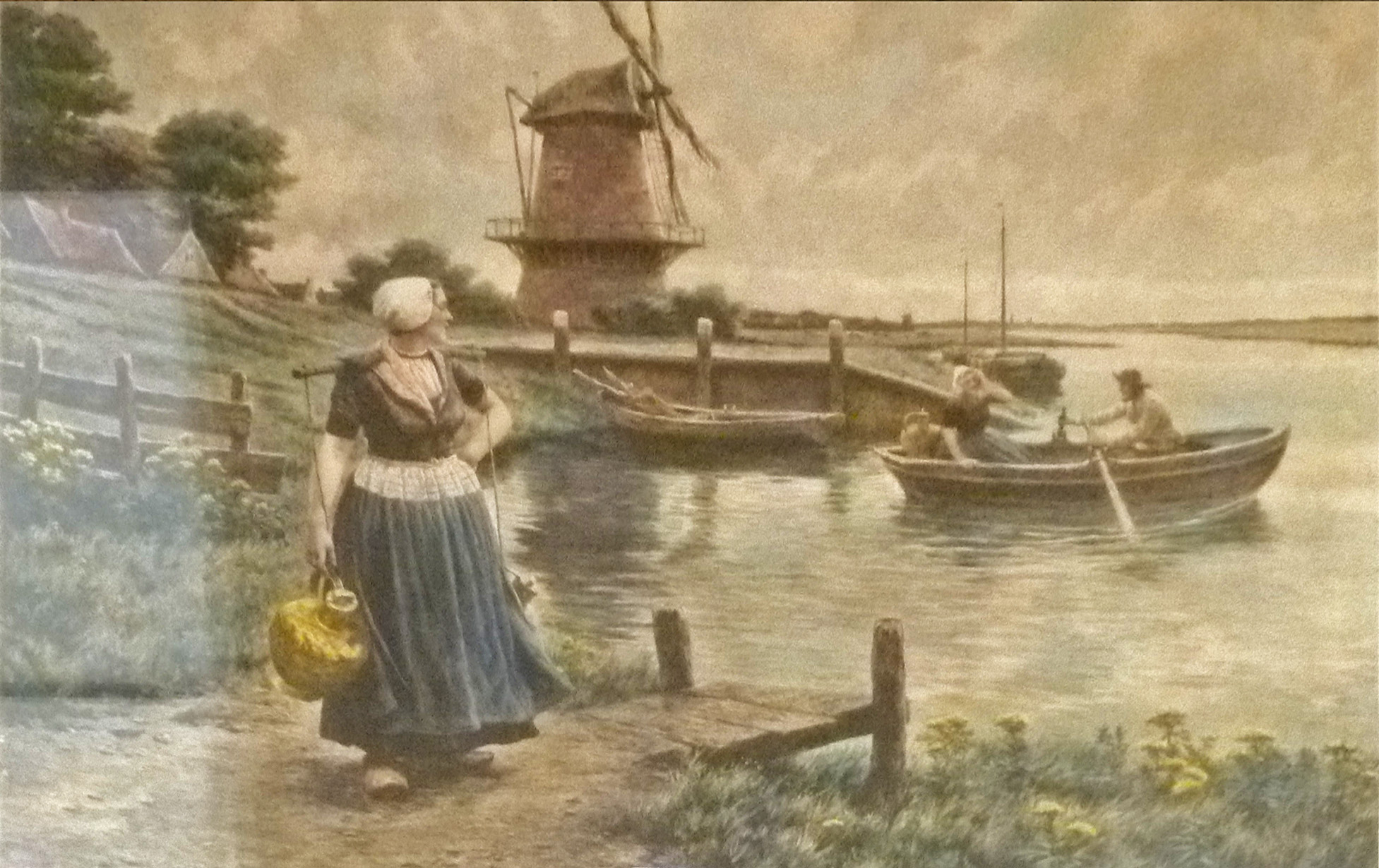 "Hollands melkmeisje", gekleurde gravure (53 x 74 cm) door Henri Houben (1858-1931)